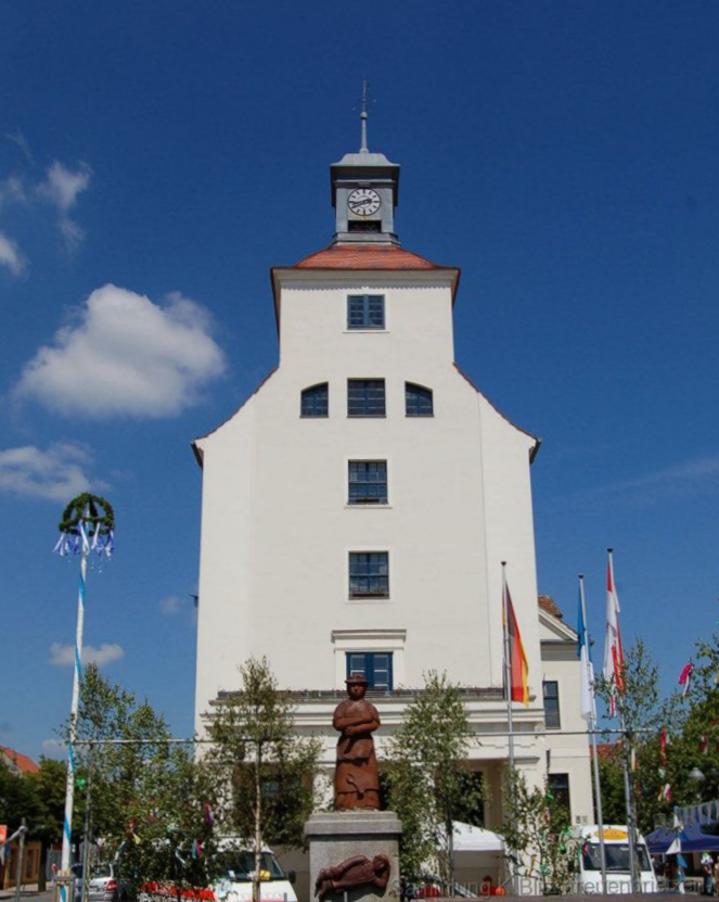 Rathaus Treuenbrietzen während des Sabinchenfestes 2006 Fotografiert von K. Blitz